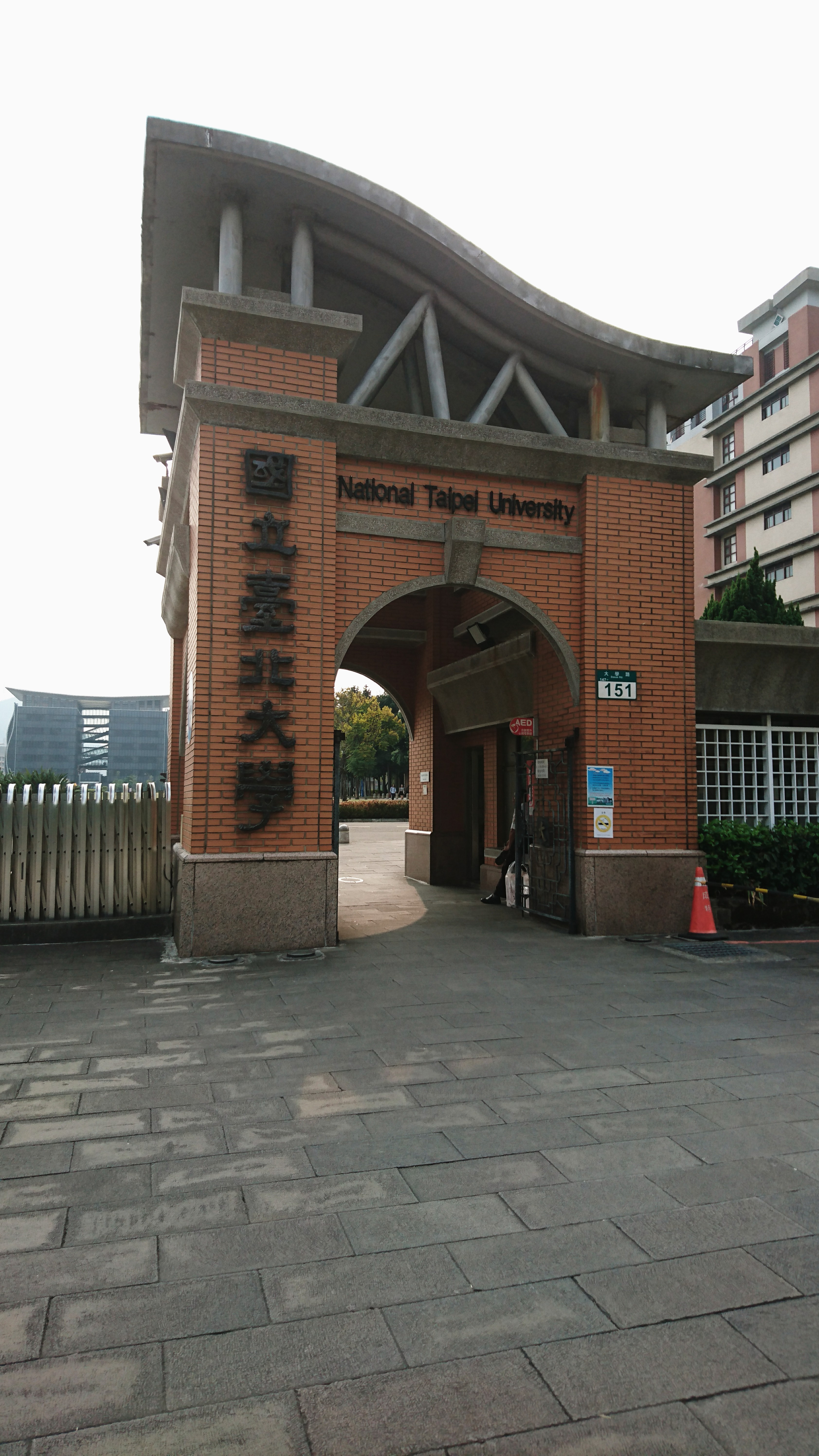 中文（台灣）: 在正門口拍攝